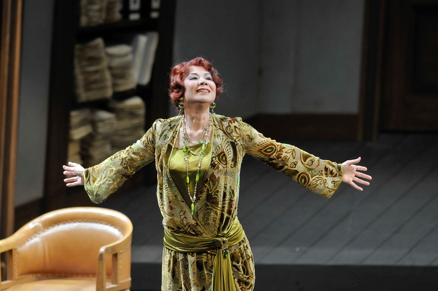 エミリア・マルティ役として出演 日生劇場にて